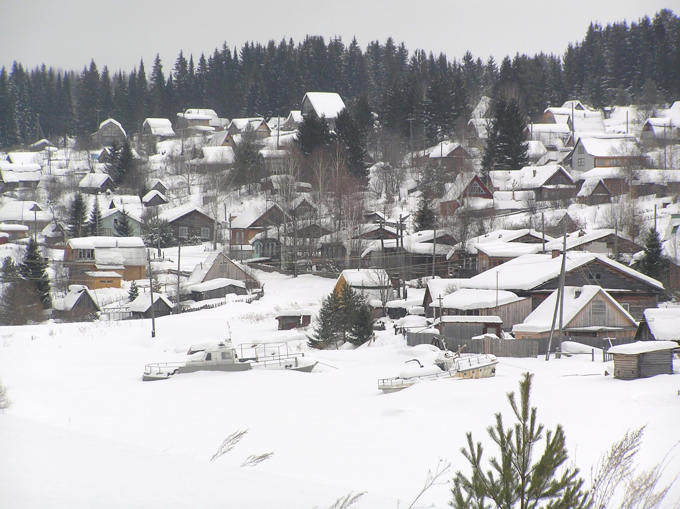 Bykovka winter.Быковка зимой